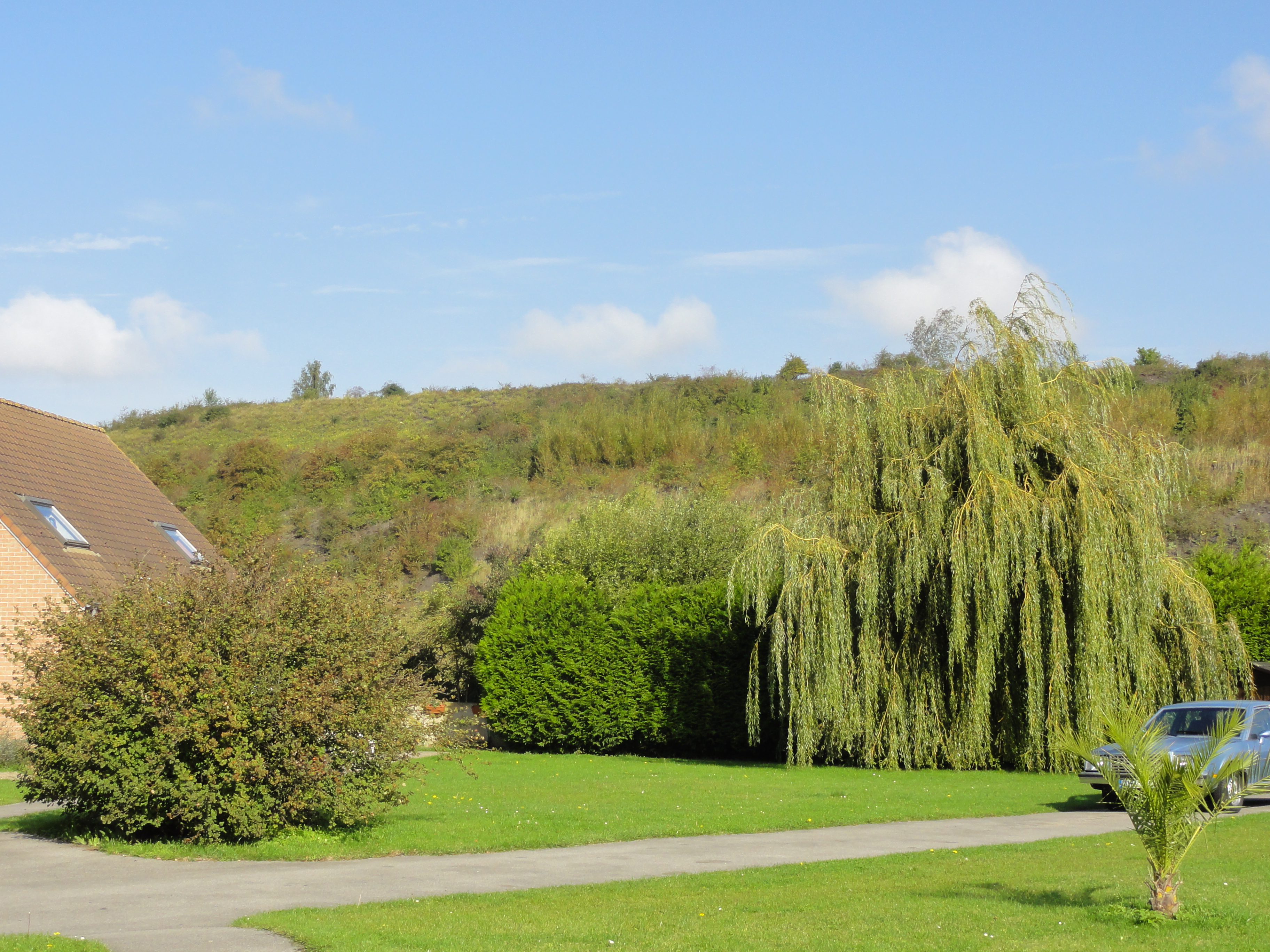 Terril n° 63 dit Décharge de Sailly, fosse n° 9 de la Compagnie des mines de Béthune dans le bassin minier du Nord-Pas-de-Calais, Sailly-Labourse, Pas-de-Calais, Nord-Pas-de-Calais, France.